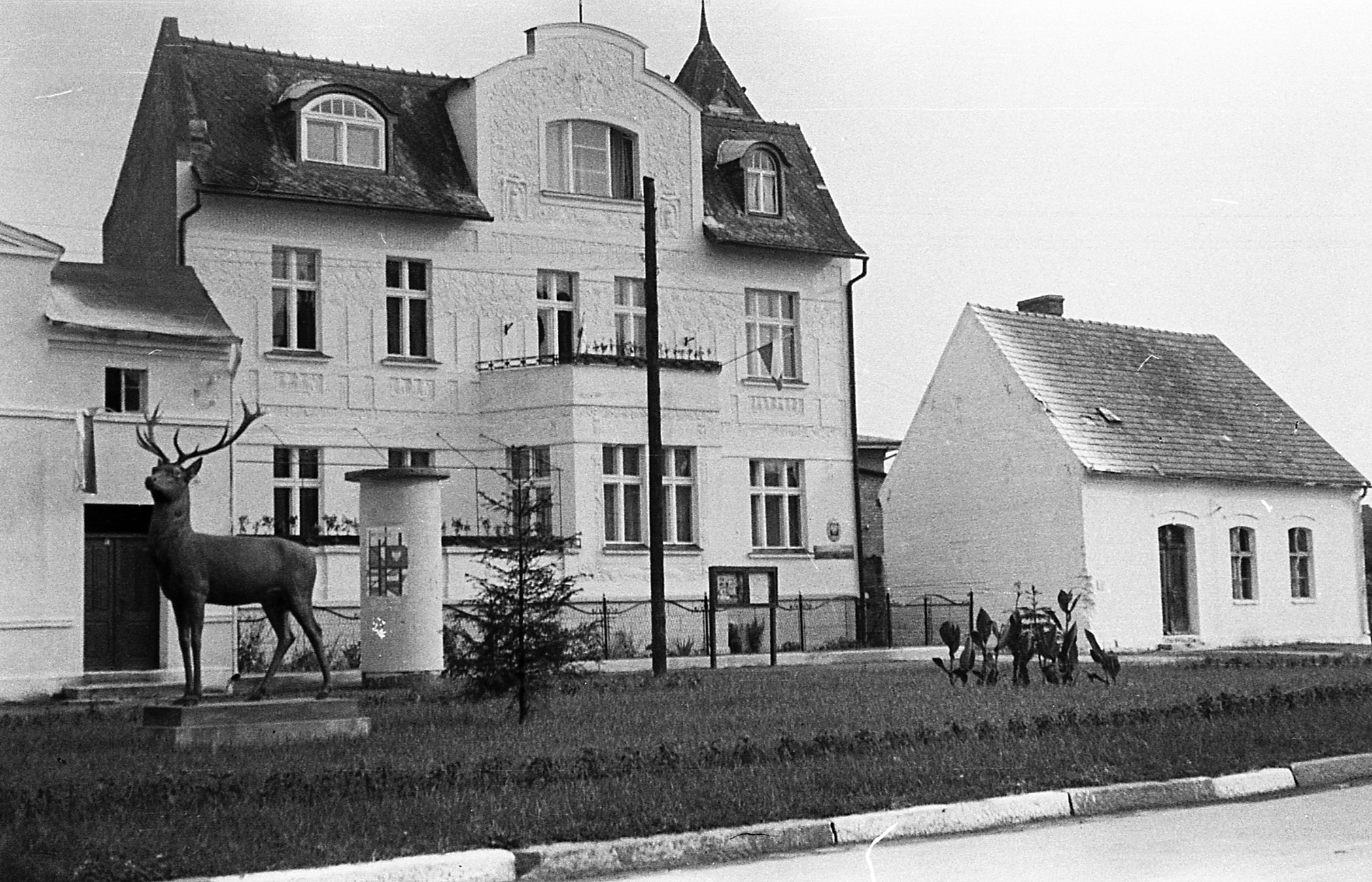 Dom Polski w Złotowie